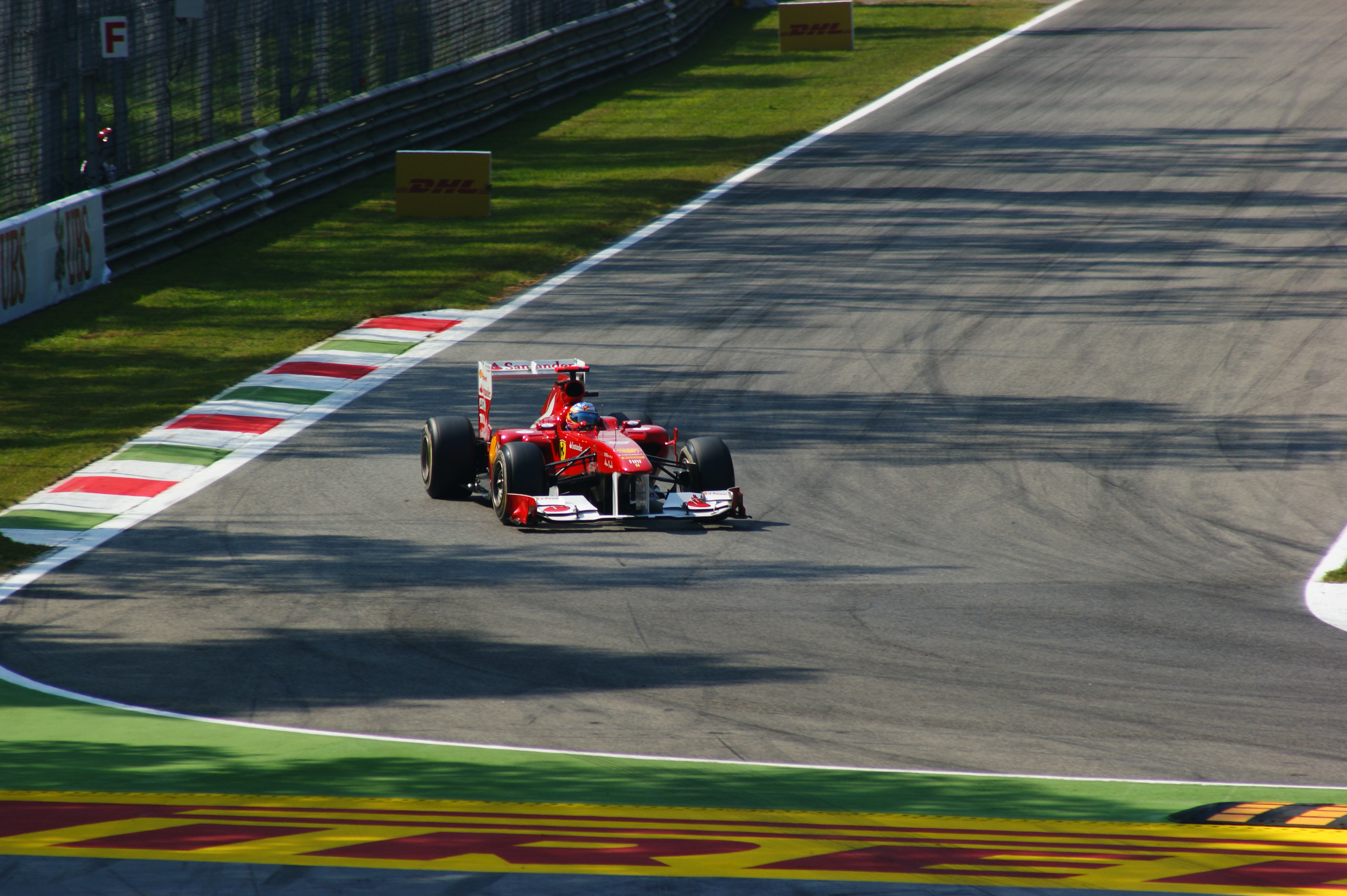 Fernando Alonso alla variante della roggia Monza 2011